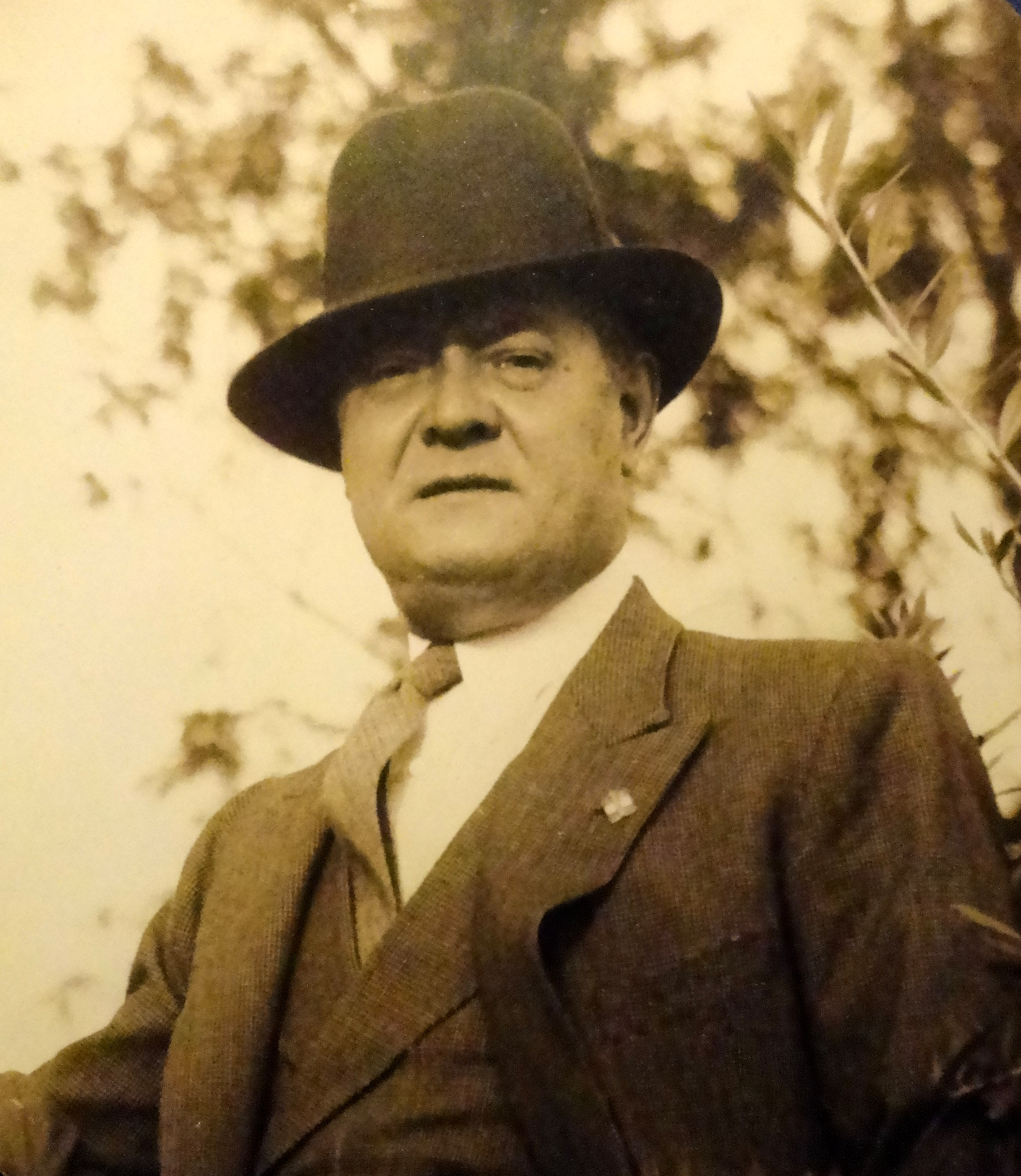 Arq. Juan Veltroni